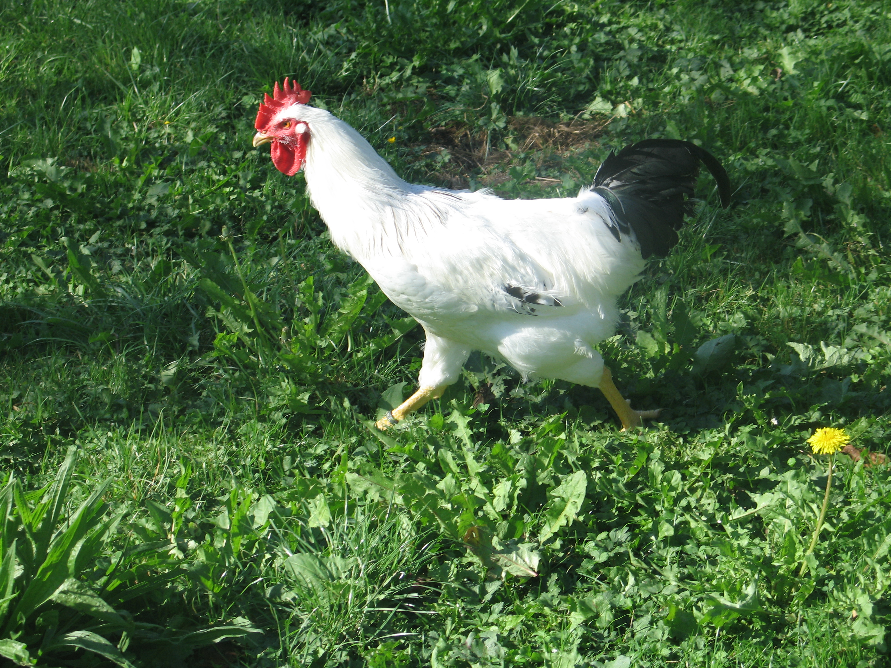 Euskal Oiloa, barietate zilarra. Oilarra